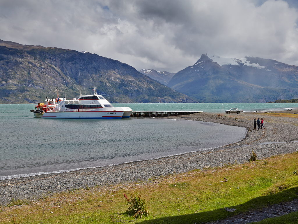 Estancia Perales